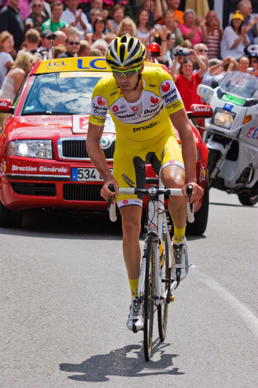 David Millar - Stage 1 Kent UK - "Cote de Goudhurst " Mountain Satge